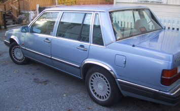 Volvo 760 1988